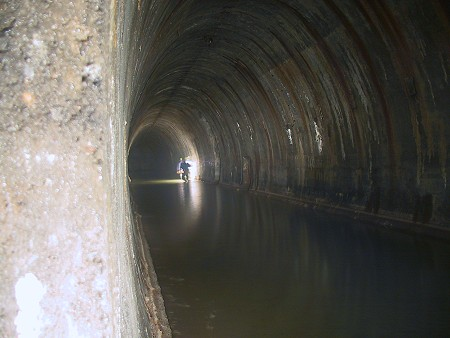 Festungsfront Oder-Warthe-Bogen, Hohlgangsystem im Mittelabschnitt – A 62